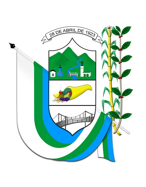 Escudo del municipio de Riofrio Valle delCauca - Colombia